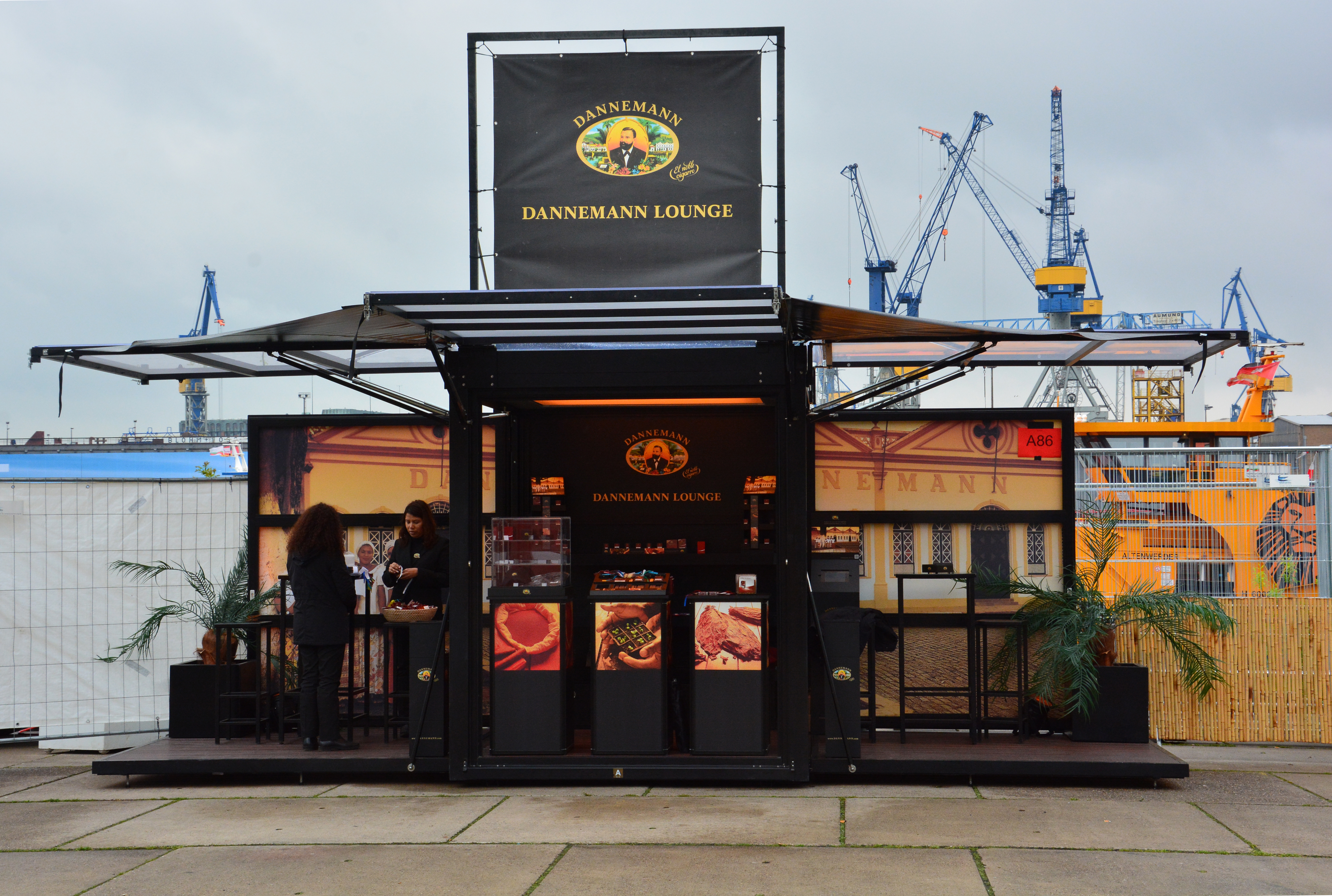 Die Dannemann Lounge beim 825. Hamburger Hafengeburtstags 2014